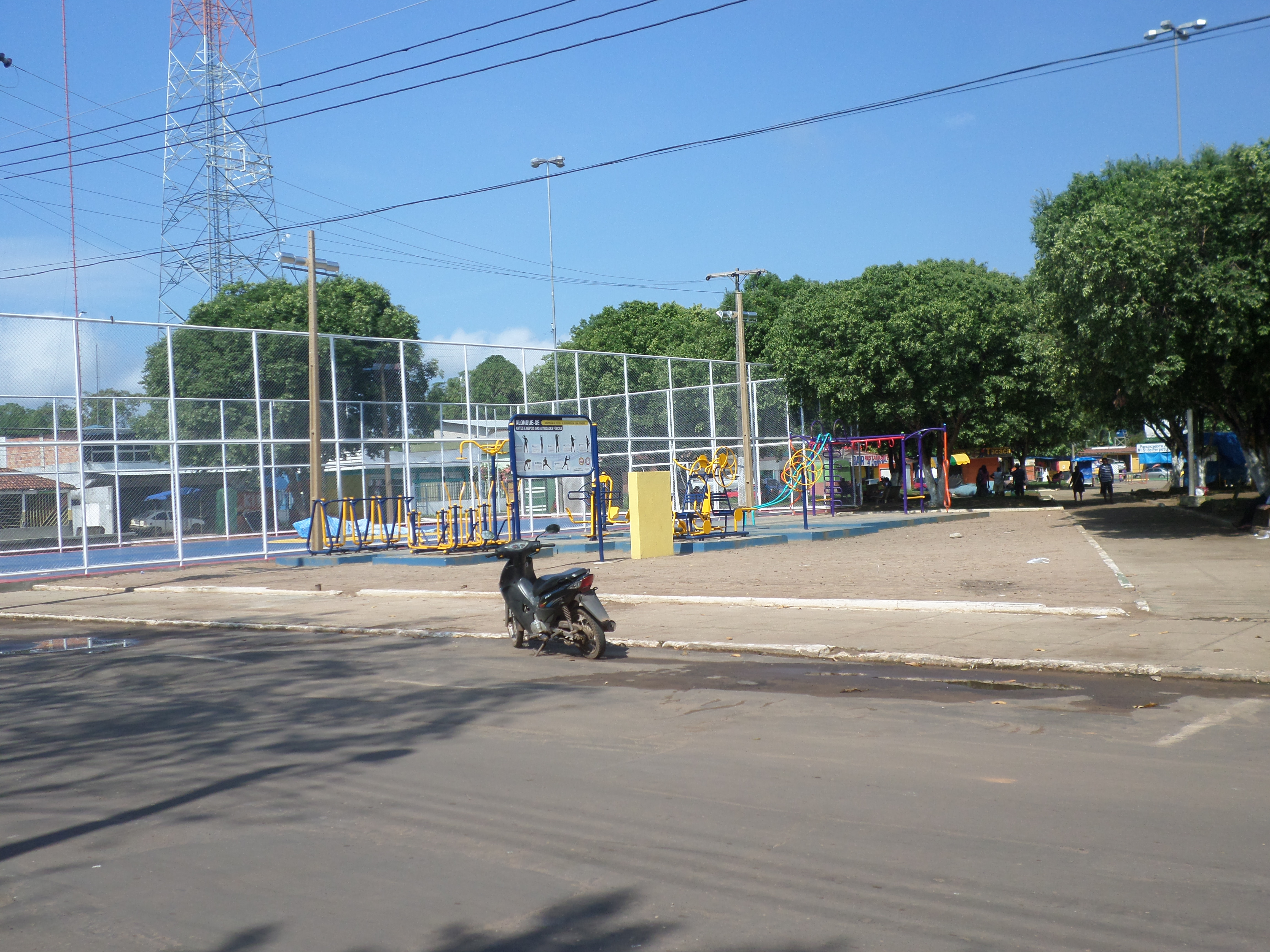 Praça no município de Iranduba, Amazonas, Brasil.